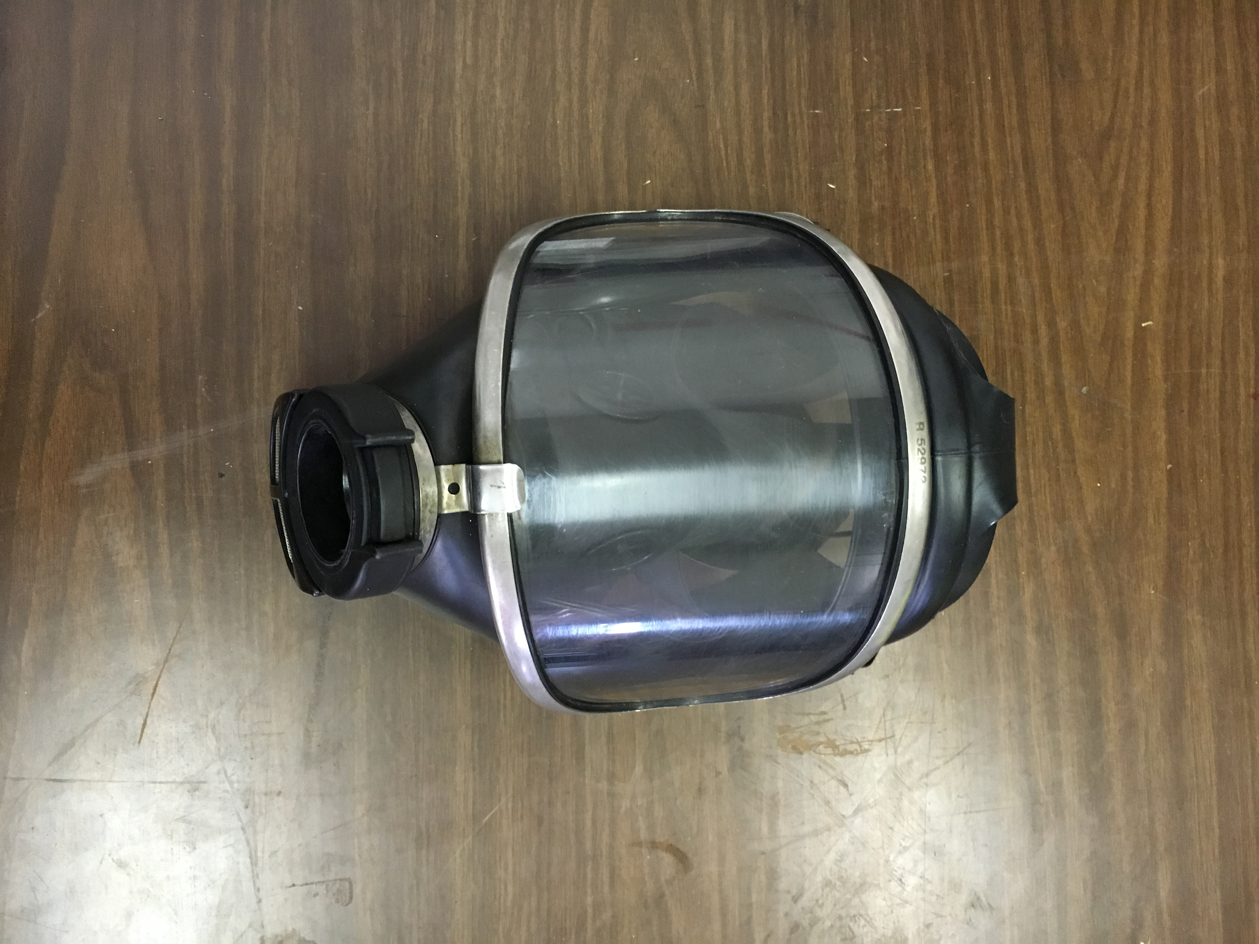 Zaščitna dihalna maska za IDA